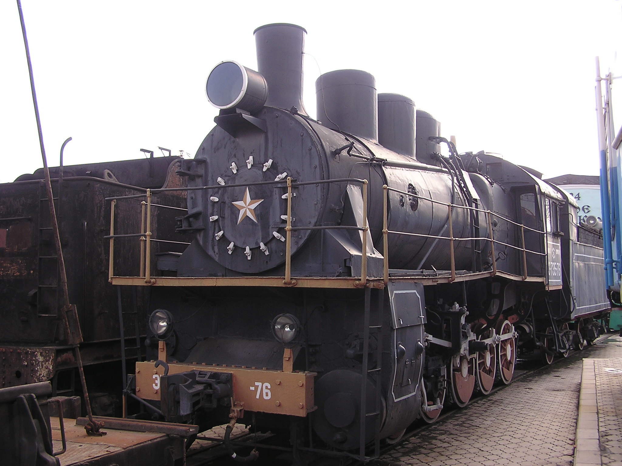 Музей истории и развития Донецкой Железной дороги. ЭМ-735-76